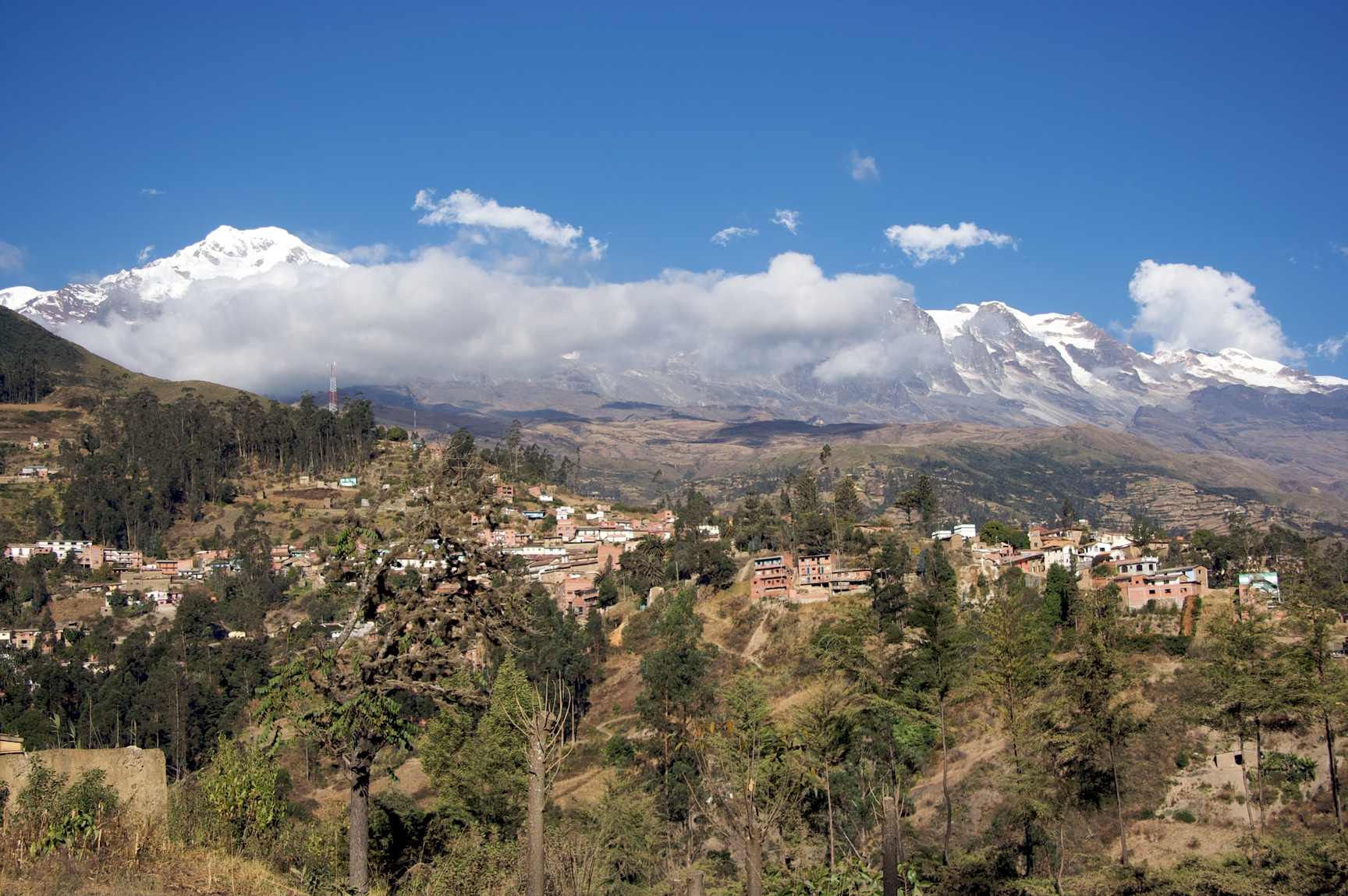 Una vista panorámica de la población de Sorata en el departamento de La Paz.